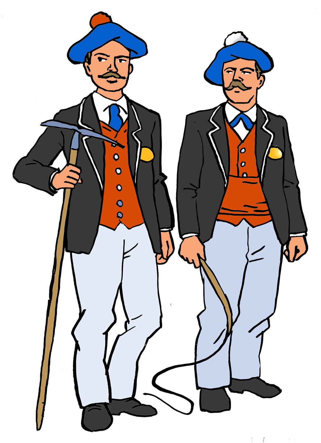 Guides de Luchon, costume (guide à pied, guide à cheval)